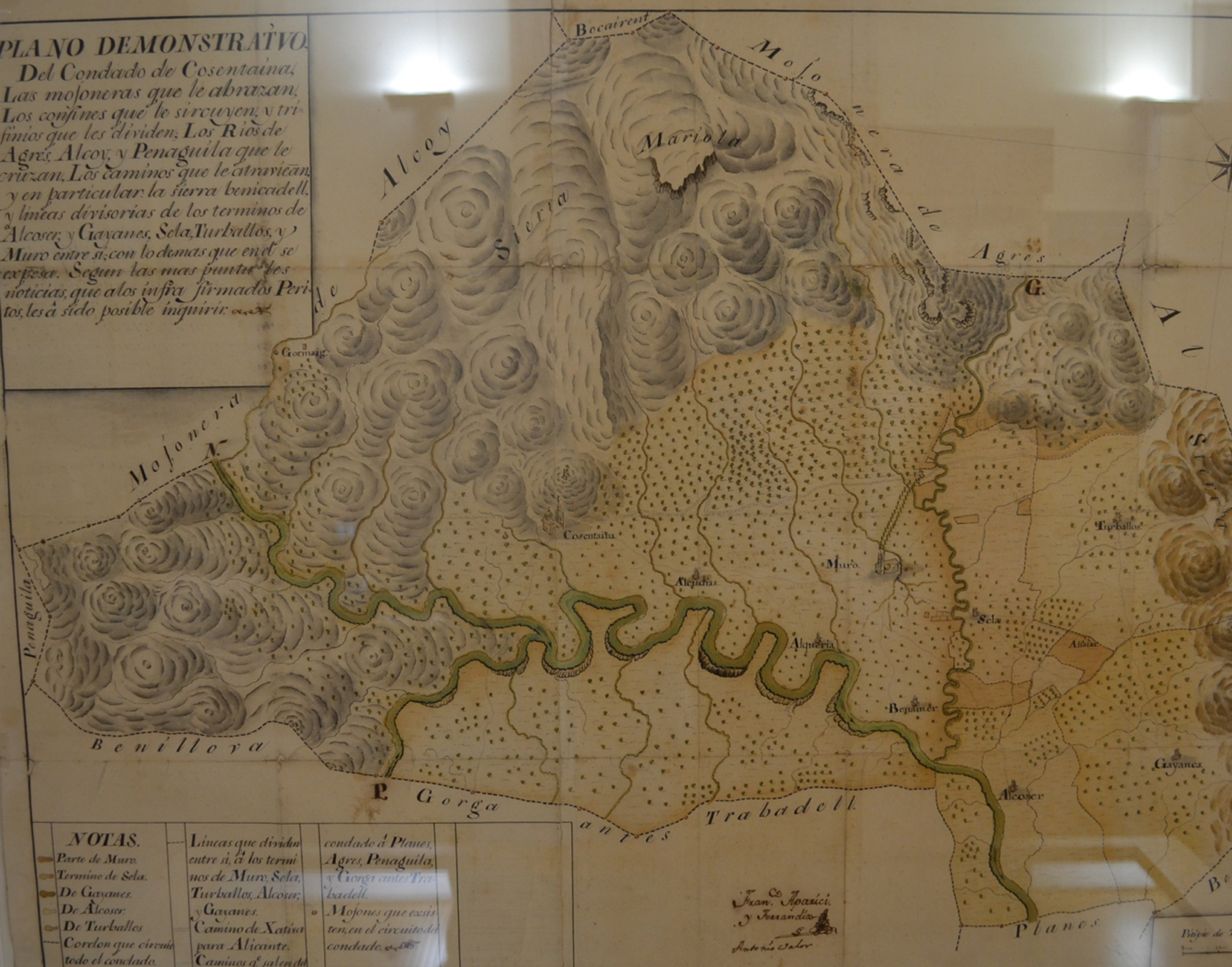 Mapa del comtat de Cocentaina dibuixat per Francesc Aparisi Ferrandiz i Antoni Valor, argimensors (1778). ARV: Mapes y plànols, núm. 234. Arxiu del Regne de València.